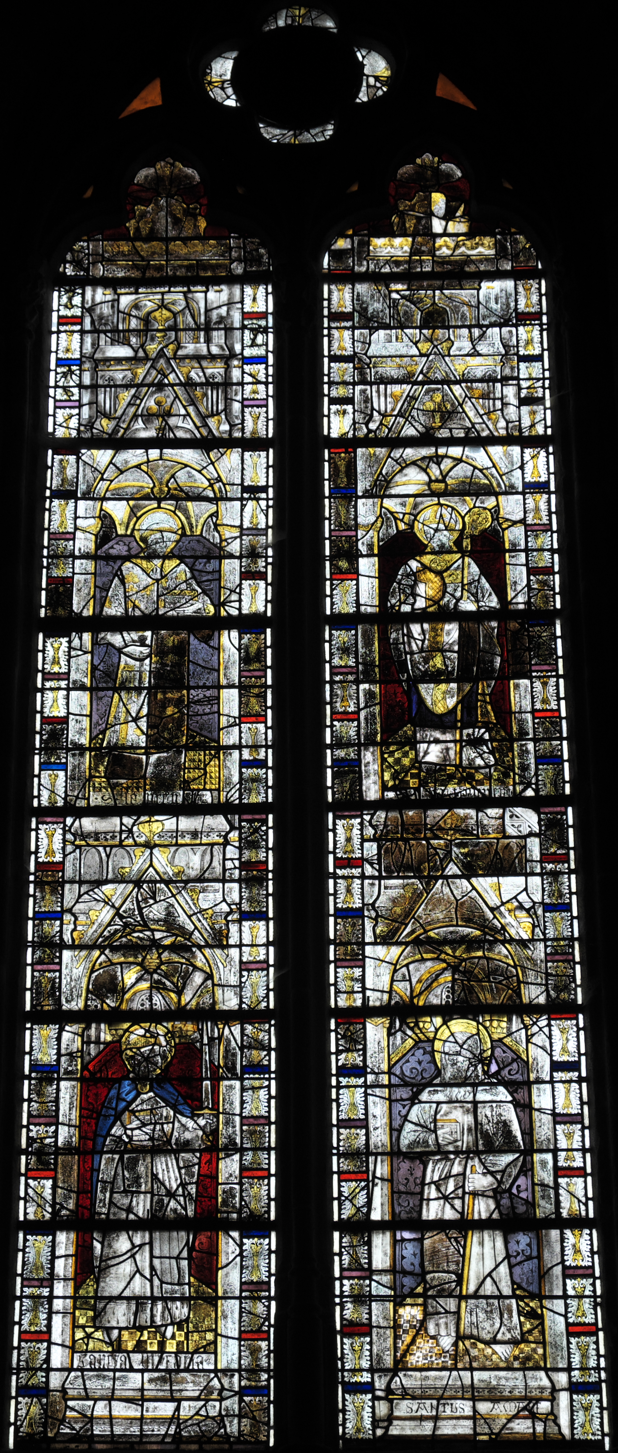 Stiftskirche Saint-Étienne in Eymoutiers im Département Haute-Vienne (Nouvelle-Aquitaine/Frankreich), Bleiglasfenster (Nr. 11) aus dem 15. Jahrhundert; Darstellung: Heilige Valeria (unten links), heiliger Amandus (unten rechts), heiliger Laurentius (oben links), heiliger Eutropius (oben rechts)